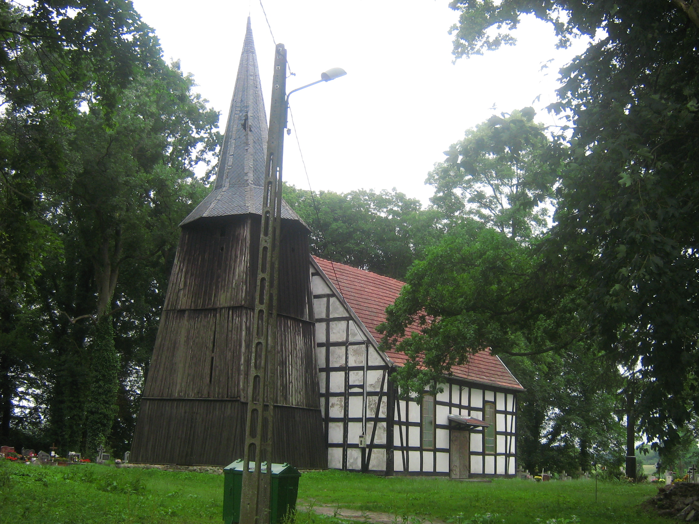 Kościół w Niemicy w województwie zachodniopomorskim, w powiecie kamieńskim, w gminie Golczewo.